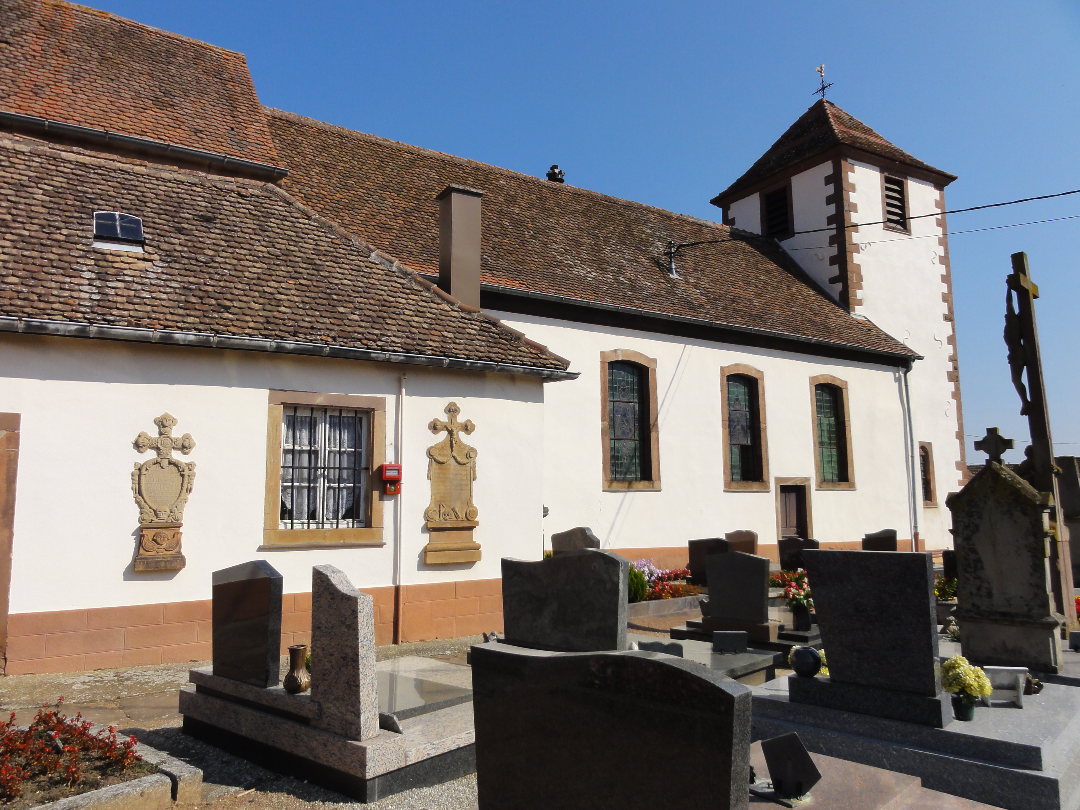 Alsace, Bas-Rhin, Rohr, Église Saint-Arbogast (IA67000965).